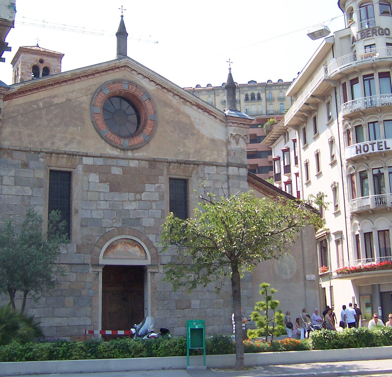 Die Kirche Santa Maria degli Angioli in Lugano, Kanton Tessin, Schweiz.